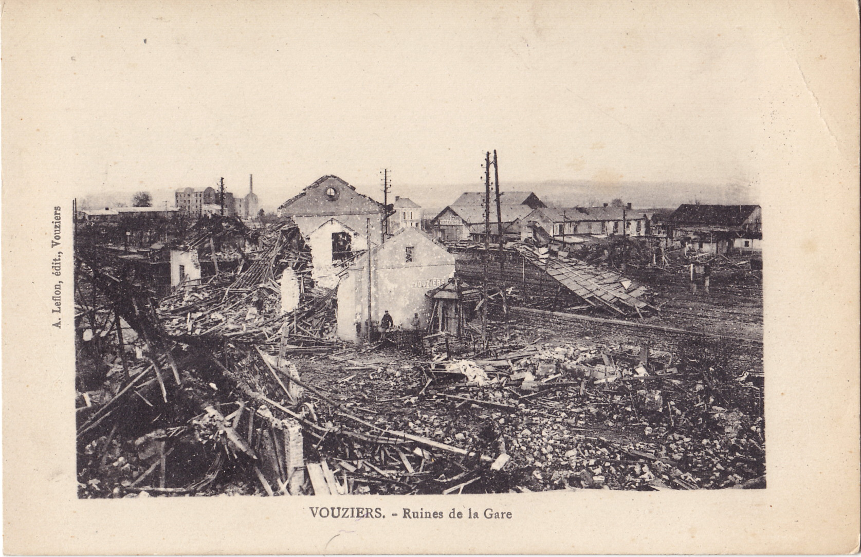 Carte postale ancienne éditée par A. Leflon à Vouziers :VOUZIERS